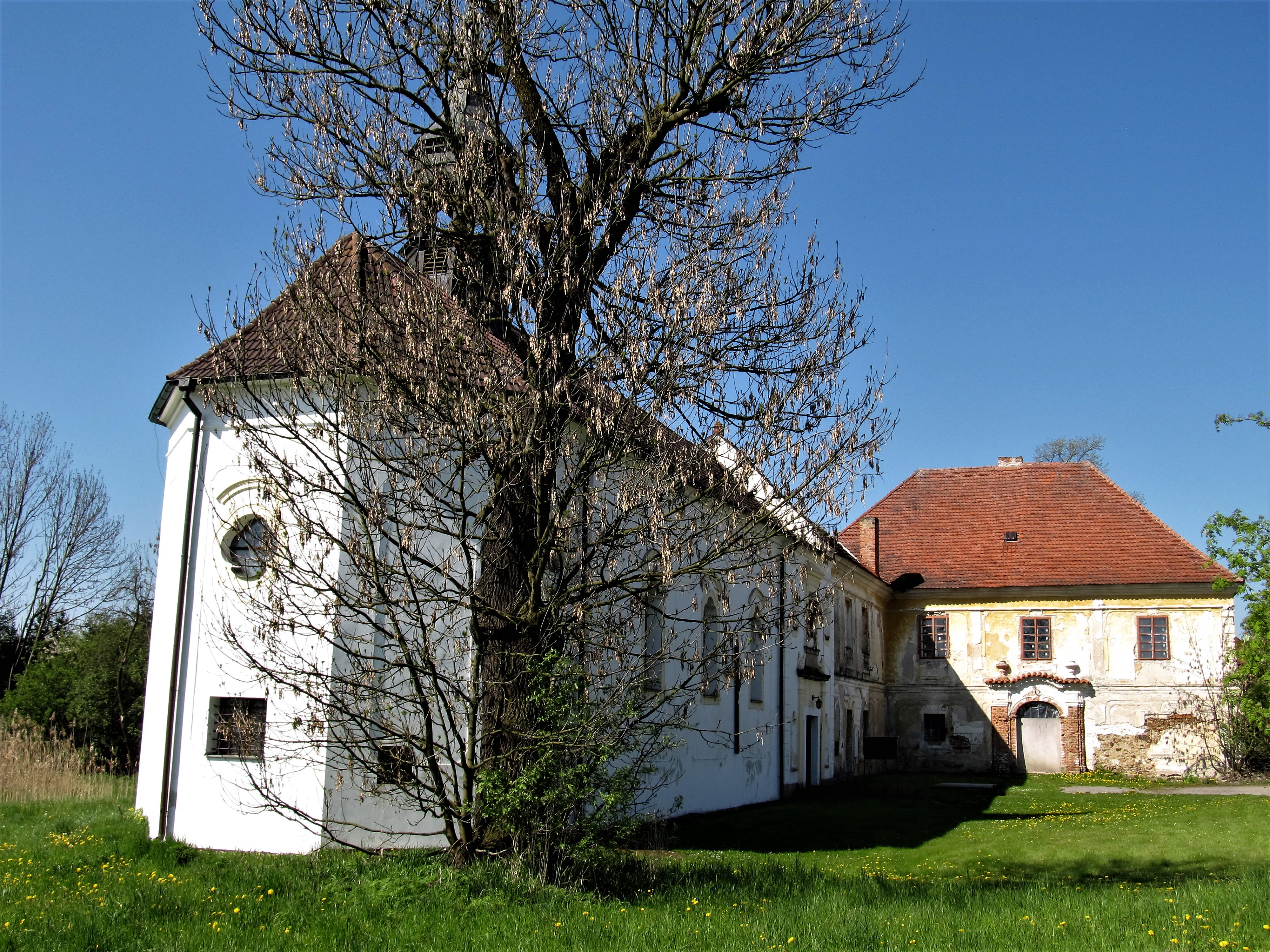 Barokní zámek a kostel Navštívení Panny Marie